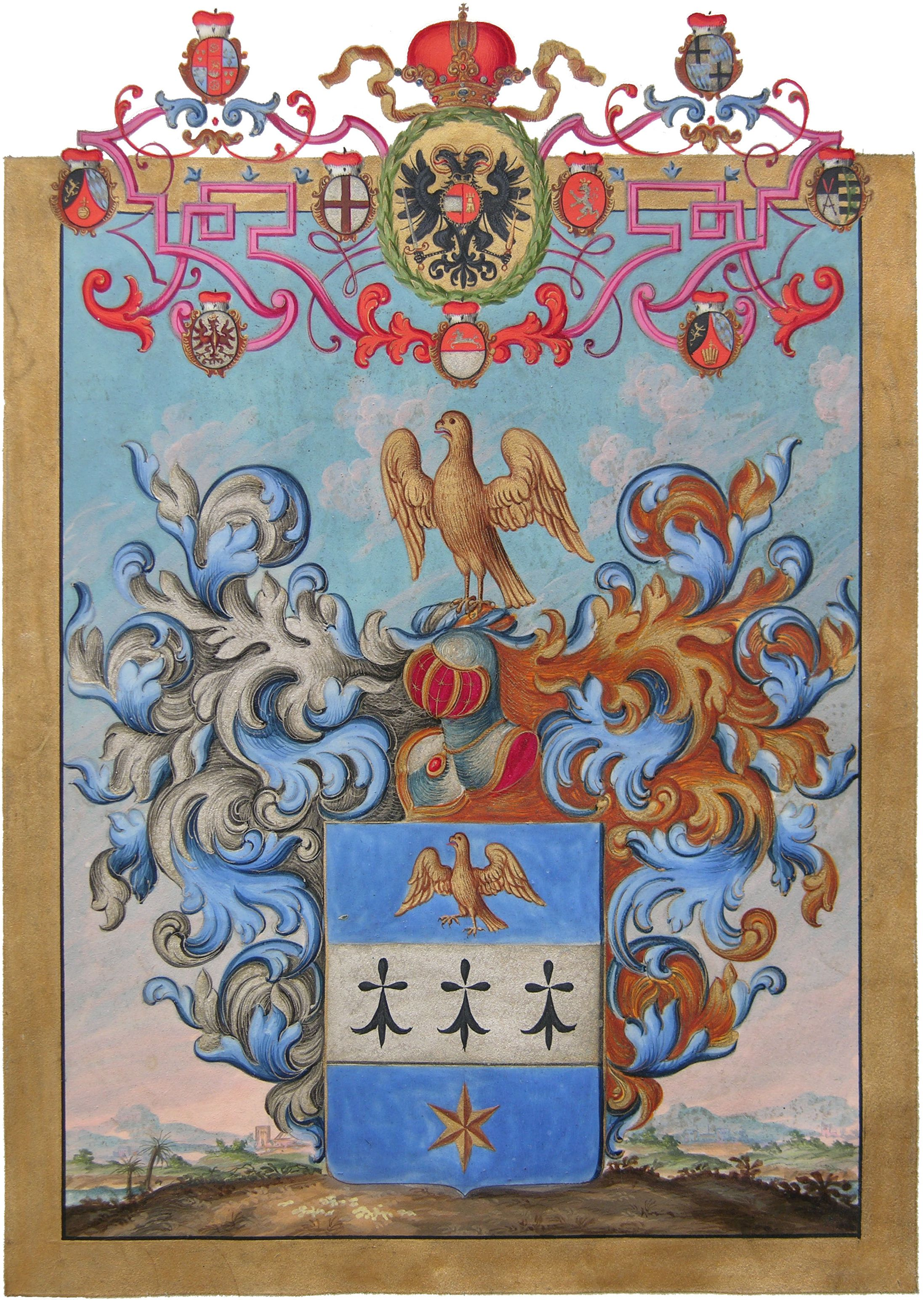 Das mit der Urkunde für André Falquet von 1725 von Karl VI. (HRR) gebesserte Falquetwappen